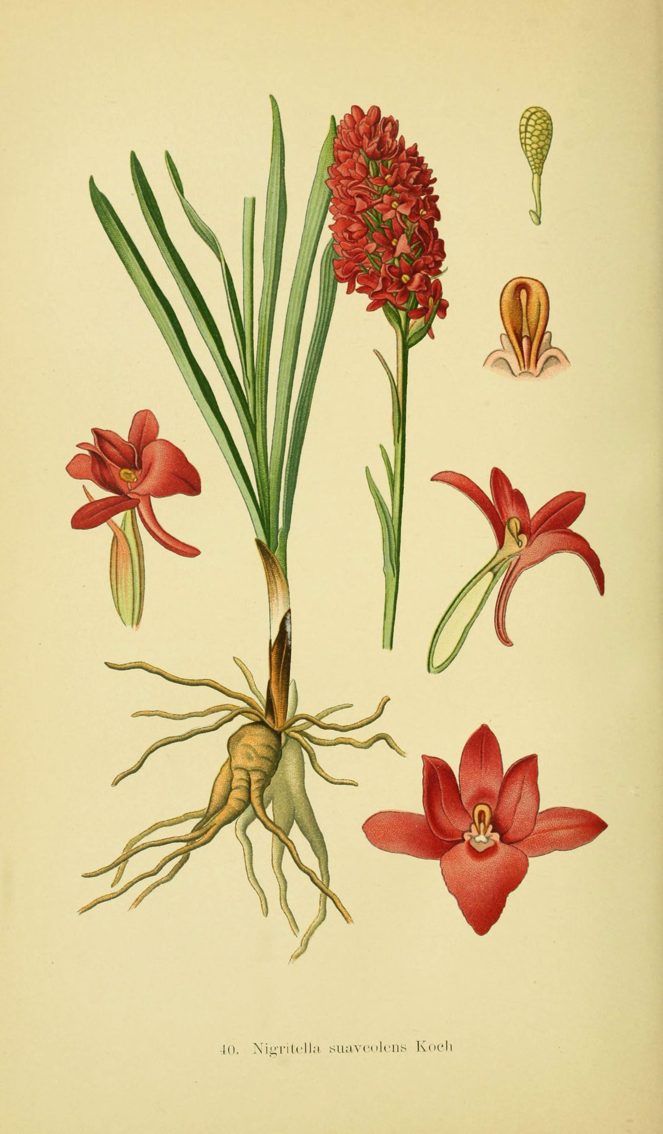 lo. Nigritella suaveolens Ivoch